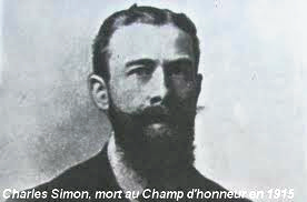 portrait de Charles Simon, secrétaire général de la Fédération gymnastique et sportive des patronages de France et précurseur de la Fédération française de football